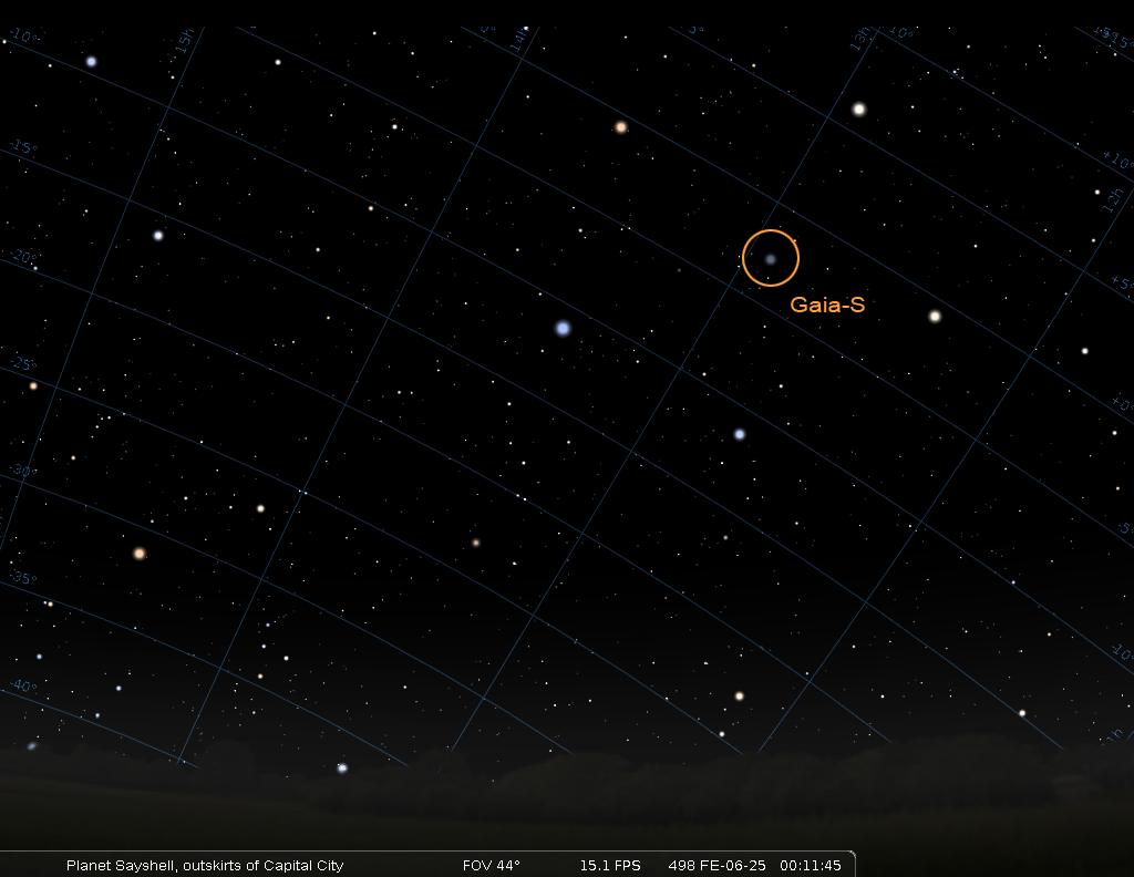 Recreación artística del cielo nocturno de Sayshell, planeta en el que se desarrolla una parte de "Los límites de la Fundación", novela de Isaac Asimov. En él se puede apreciar una constelación en forma de pentágono (las Cinco Hermanas) y en cuyo centro aproximado está situado el sol de Gaia.